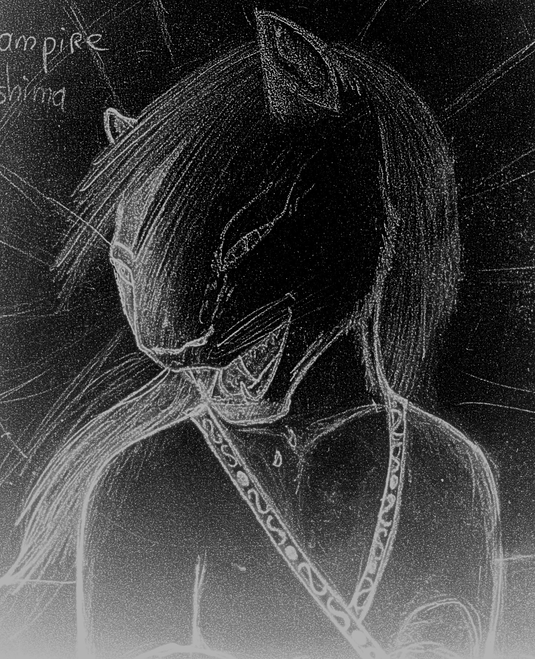 Chat-vampire des Nabeshima